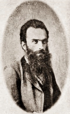 Nikolaj Nikolaevič Kolodkevič